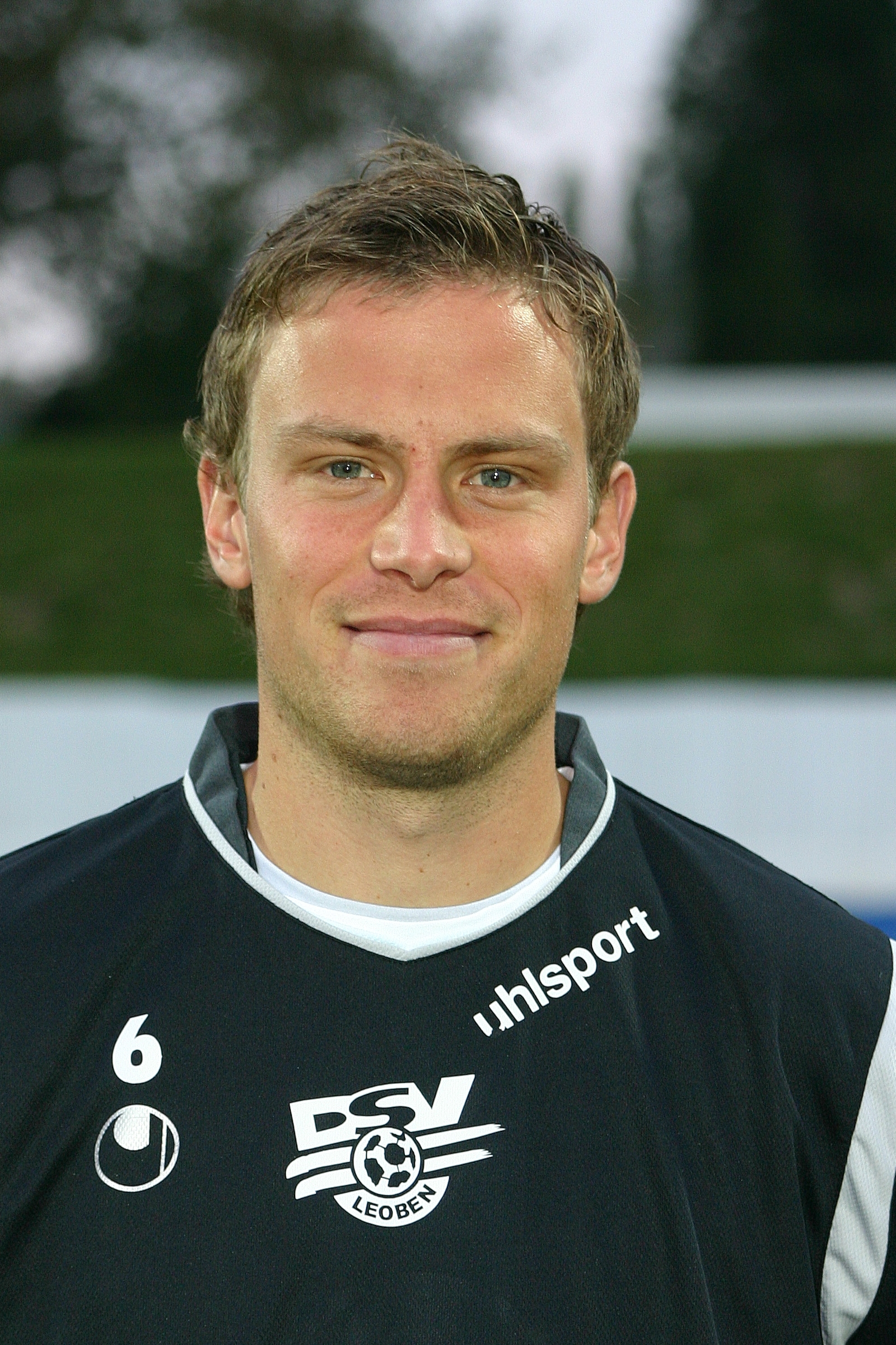 Gerald Säumel (DSV Leoben)